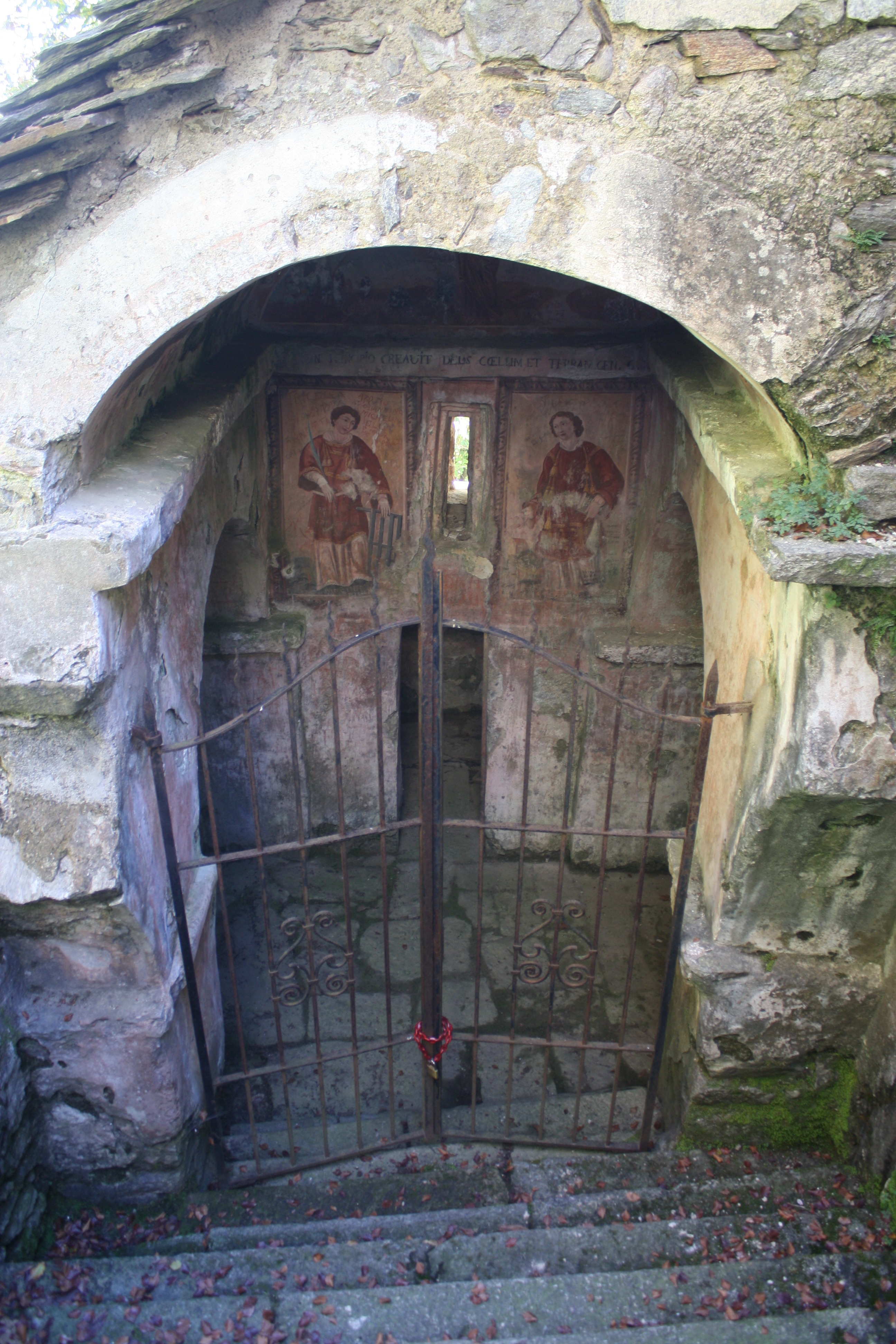 Cappella esterna della chiesa di San Salvatore a Massino Visconti (NO).